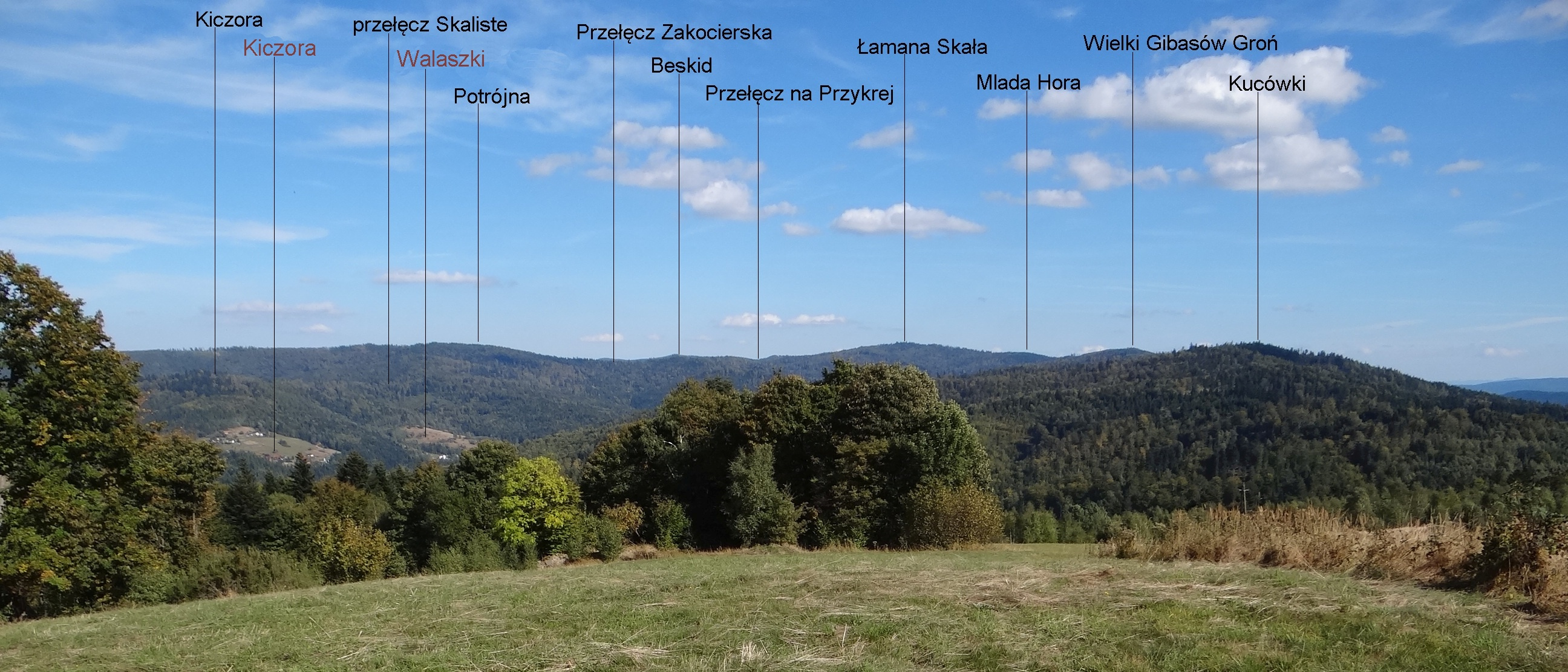 Widok ze Ścieszków Gronia